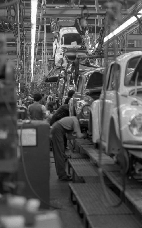 VW-Werk, Wolfsburg Endmontage Käfer